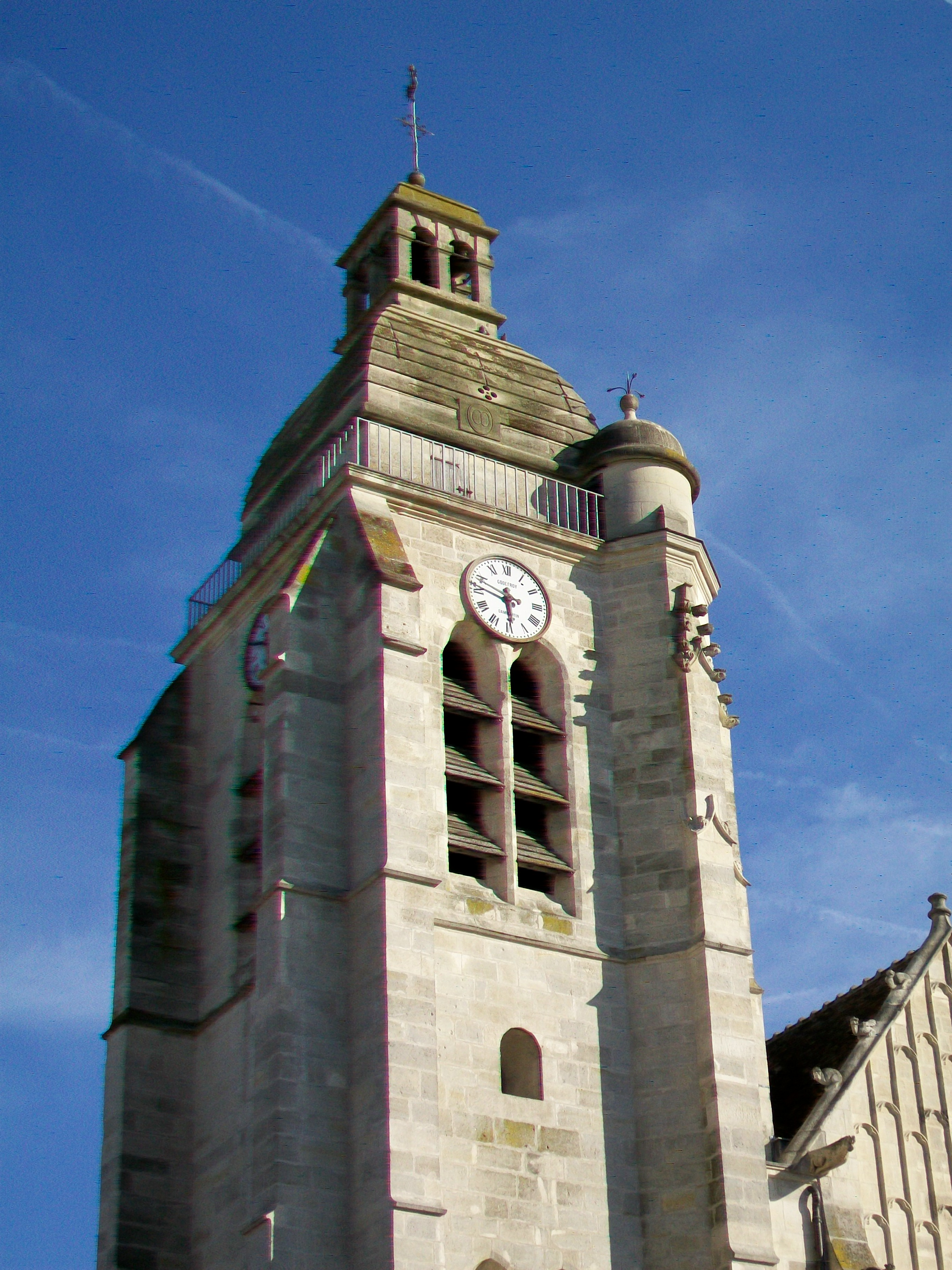 La partie supérieure du clocher.